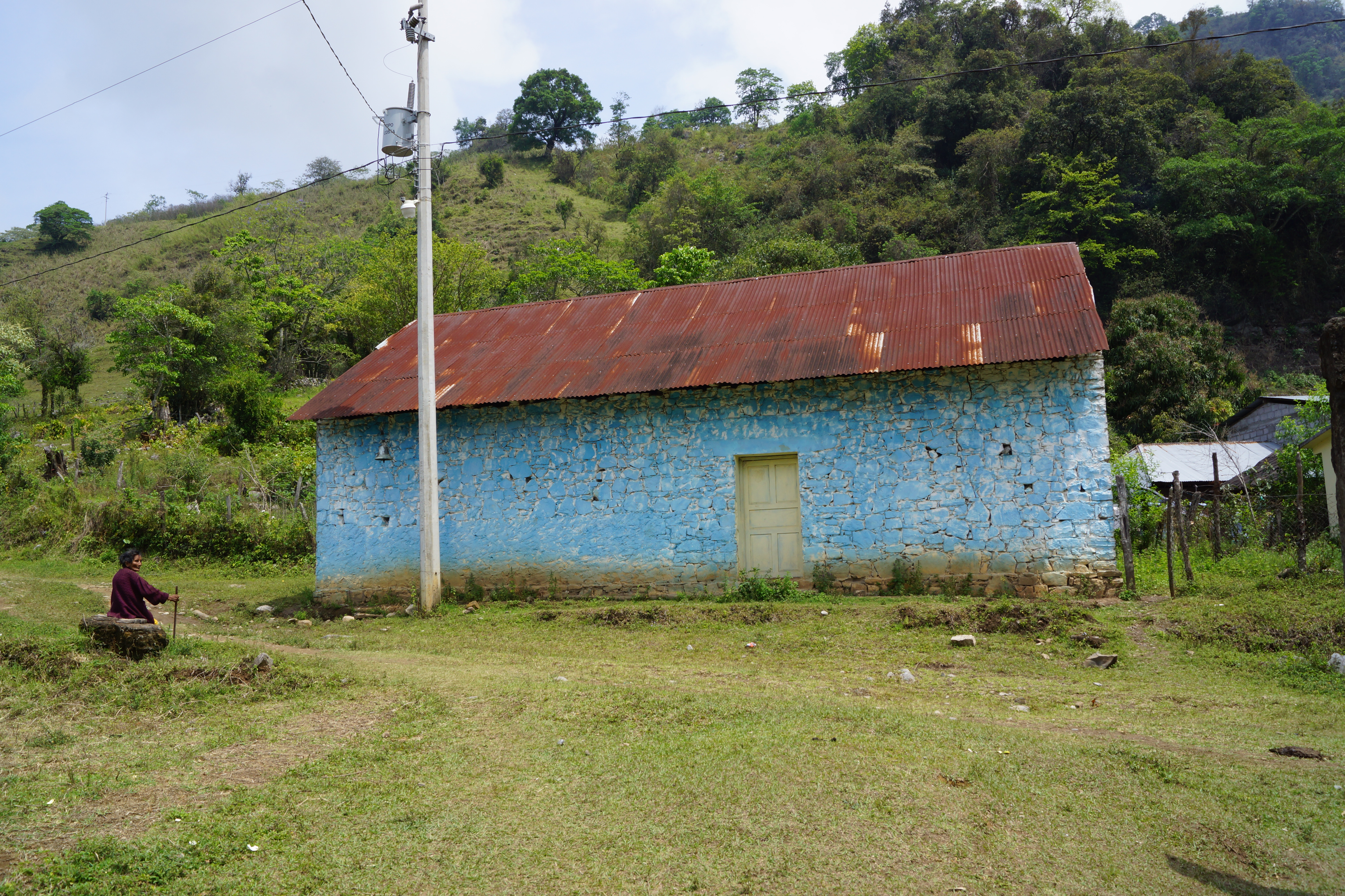 A este humilde recinto acuden los habitantes de Xitlama para dar gracias y para arrepentirse de algo que pudieran hacer.